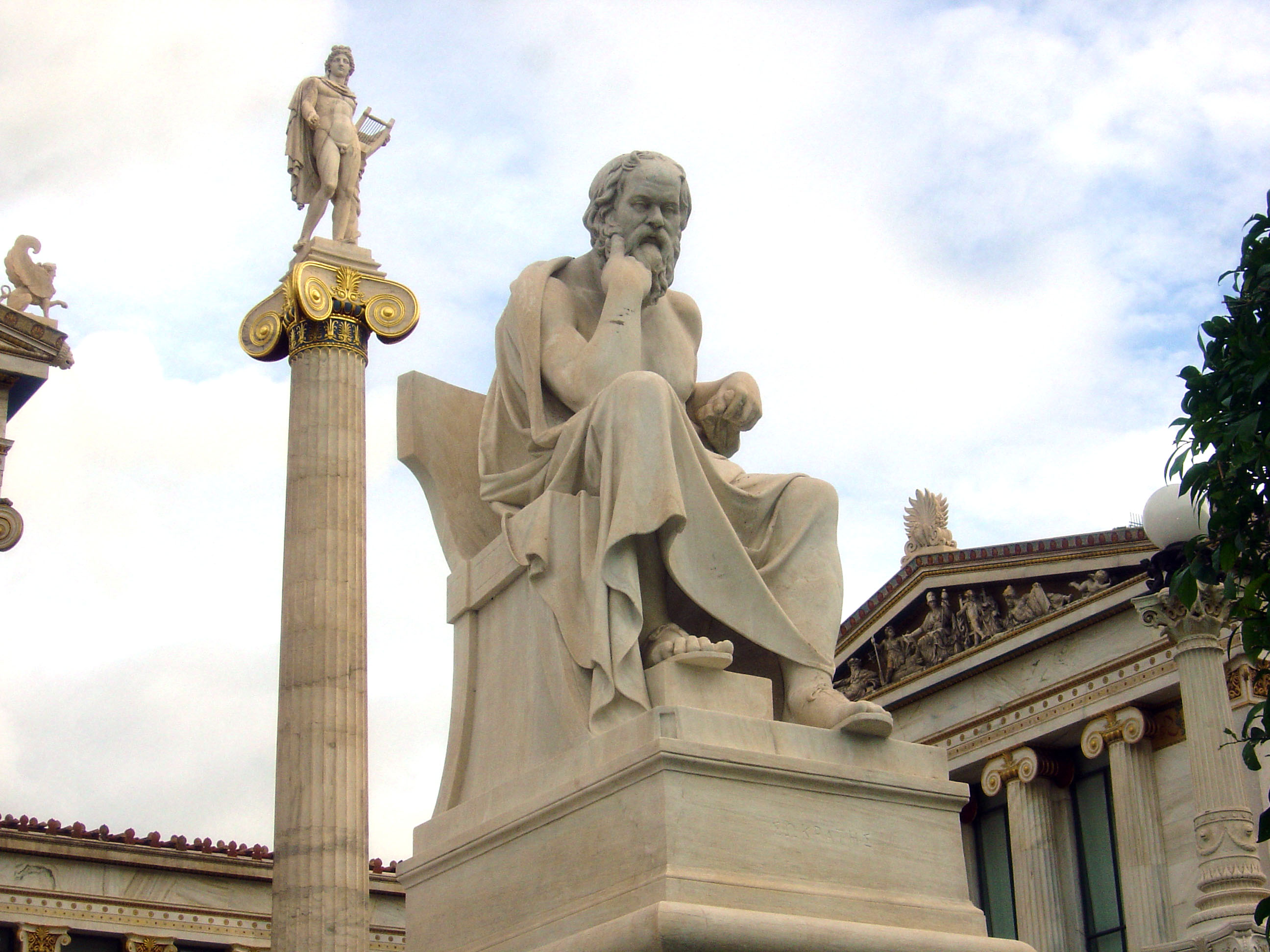 Σωκράτης. Έργο του Λεωνίδα Δρόση (1843 - 1884), Αθήνα - Περίβολος Ακαδημίας Αθηνών.